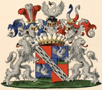 Igelströmi suguvõsa krahvivapp